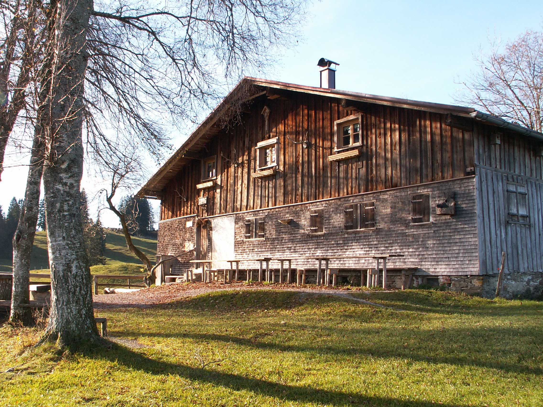 Pfarralpe bei Missen-Wilhams